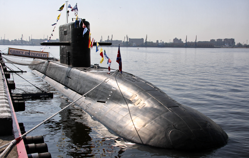 Дизель-электрическая подводная лодка Б-585 Санкт-Петербург проекта 677 Лада (B-585 Sankt-Peterburg project 677 Lada class diesel-electric submarine)